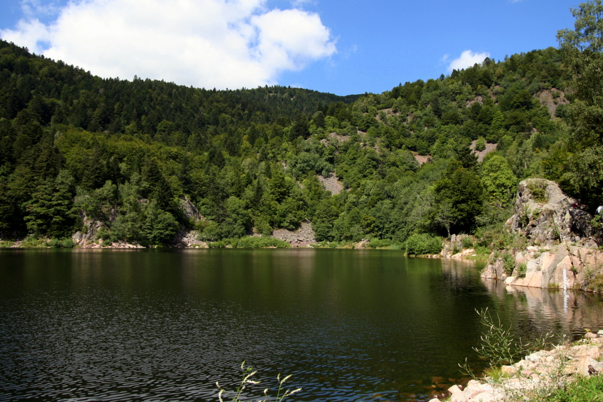 Lac du grand Neuweiher, près de Oberbruck dans la vallée de Masevaux, Haut-Rhin, Alsace, France